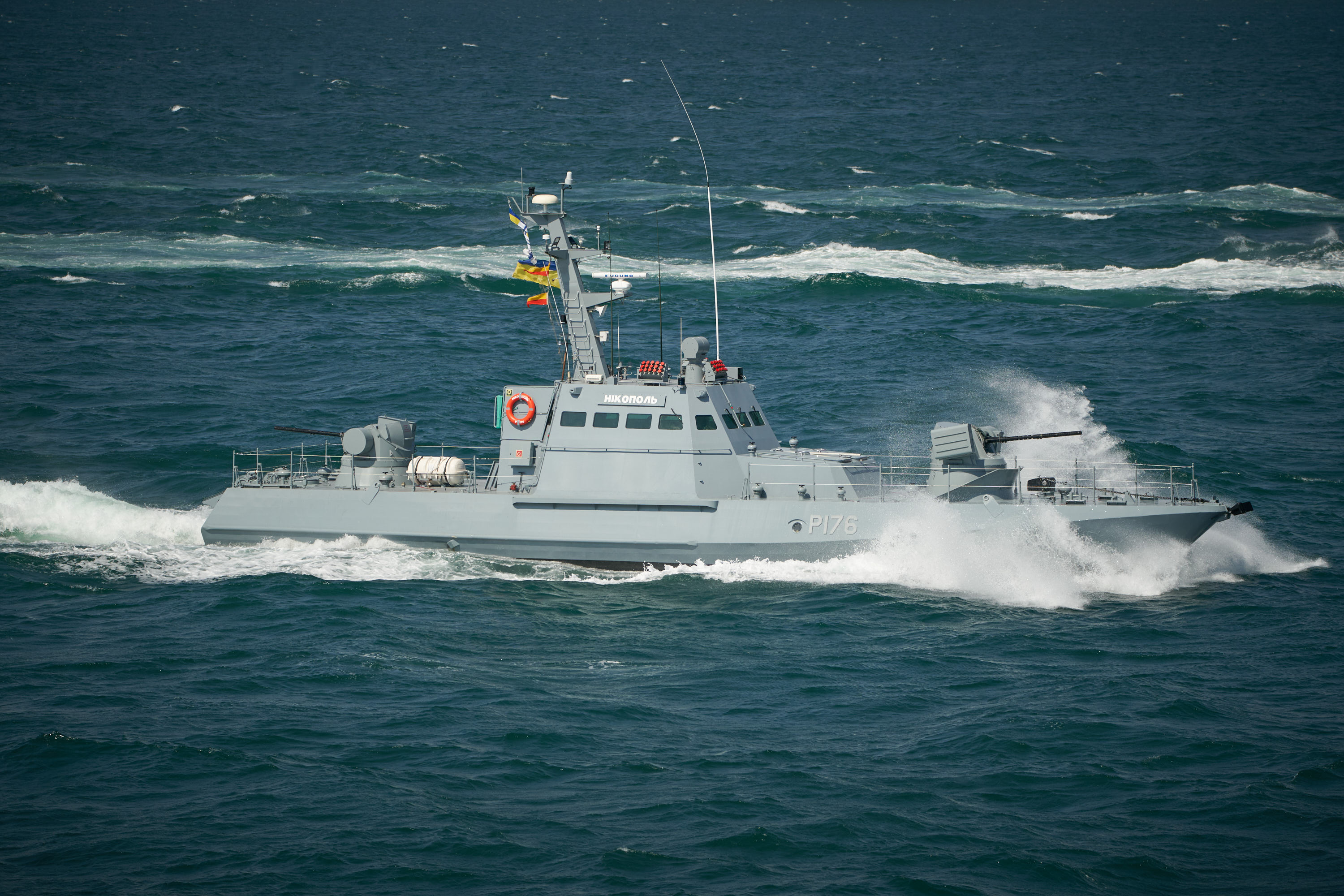 Нікополь P176 — малий броньований артилерійський катер проекту 58155 «Гюрза-М» Військово-Морських Сил України.